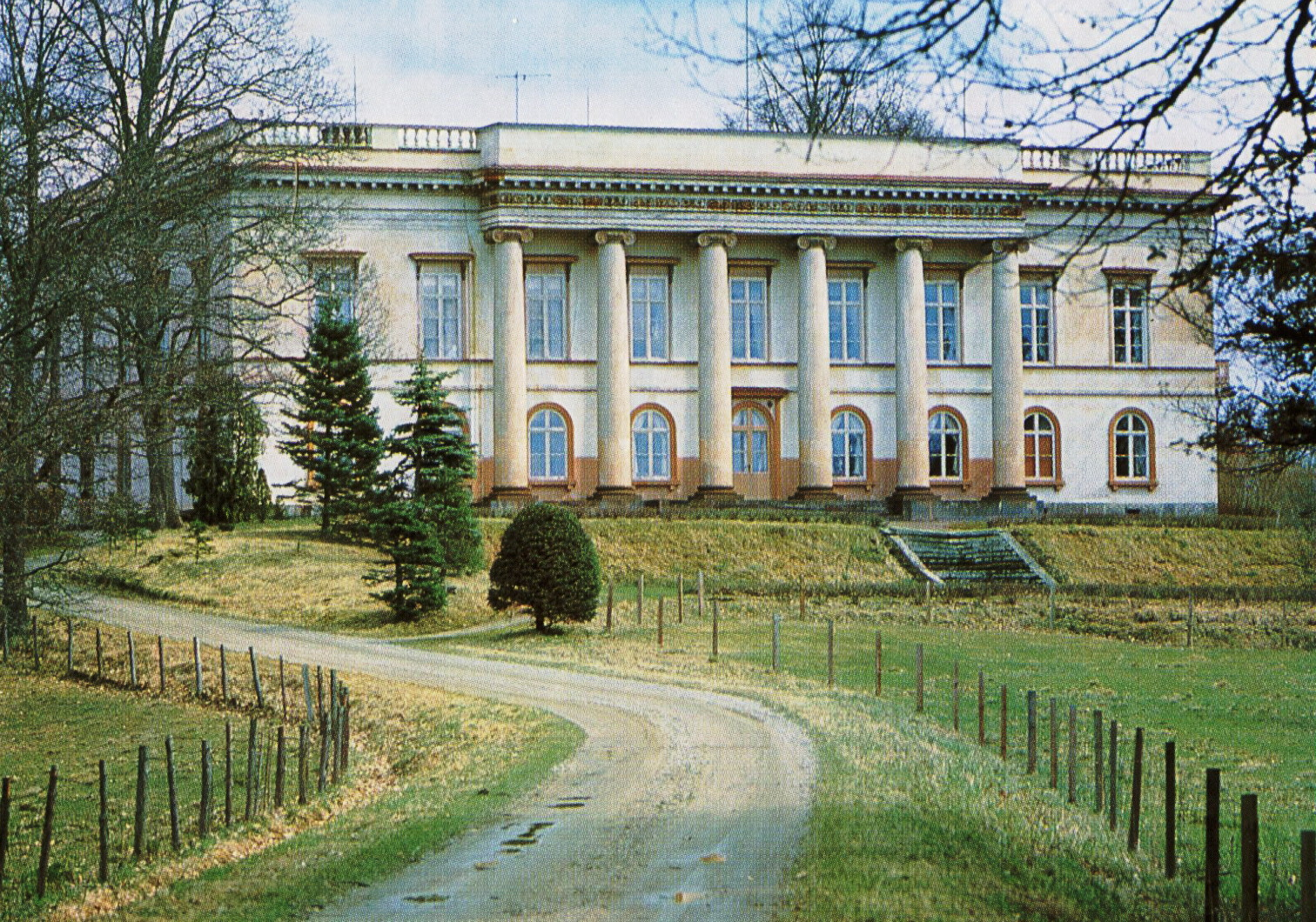 Ekensholms slott huvudbyggnad